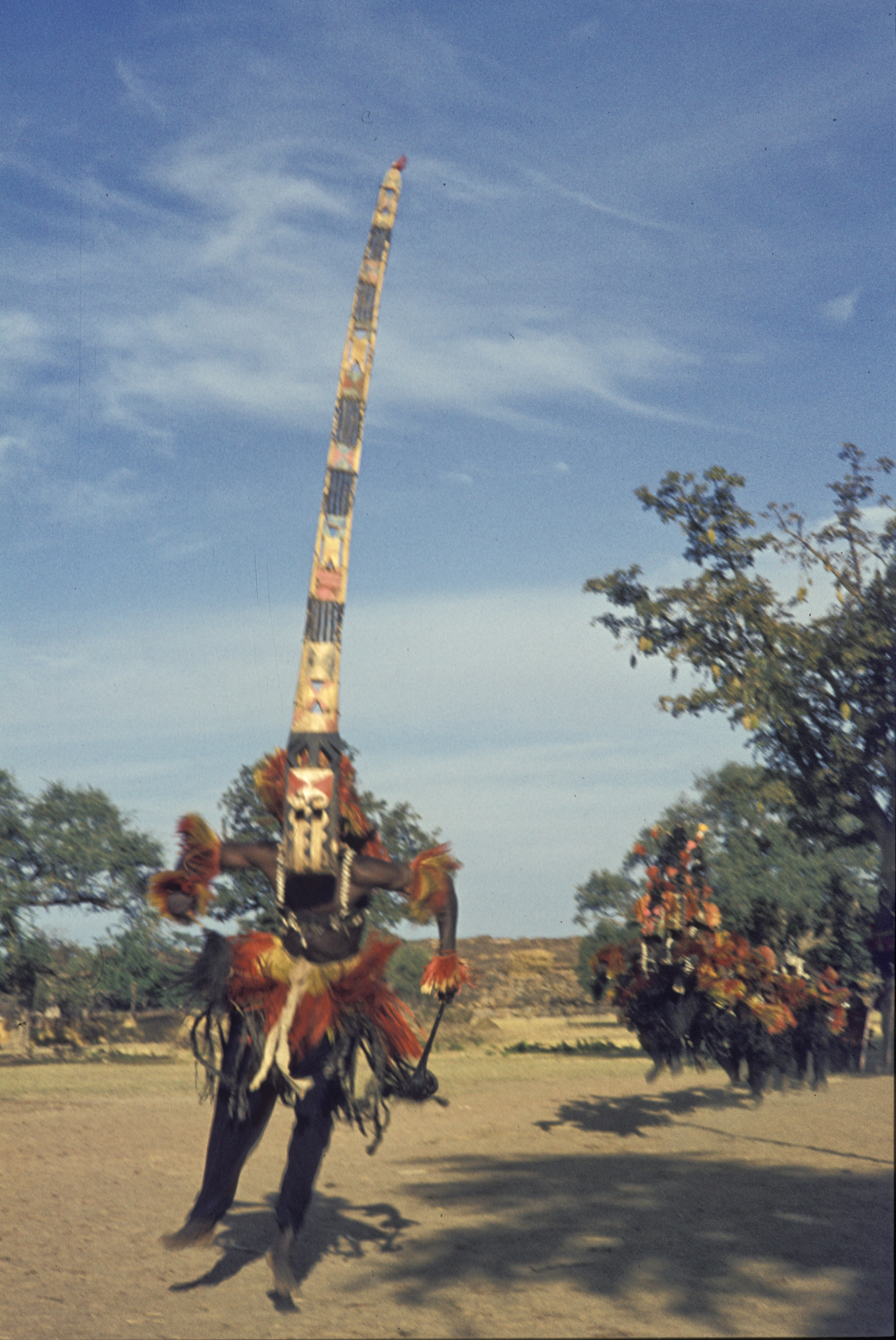 Mali